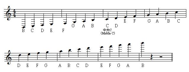 五線譜